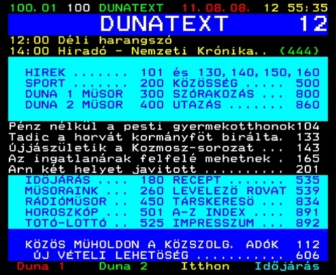 A Duna TV régi teletextje